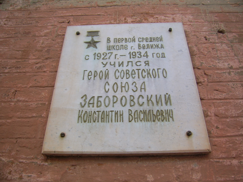 be:Горад Веліж